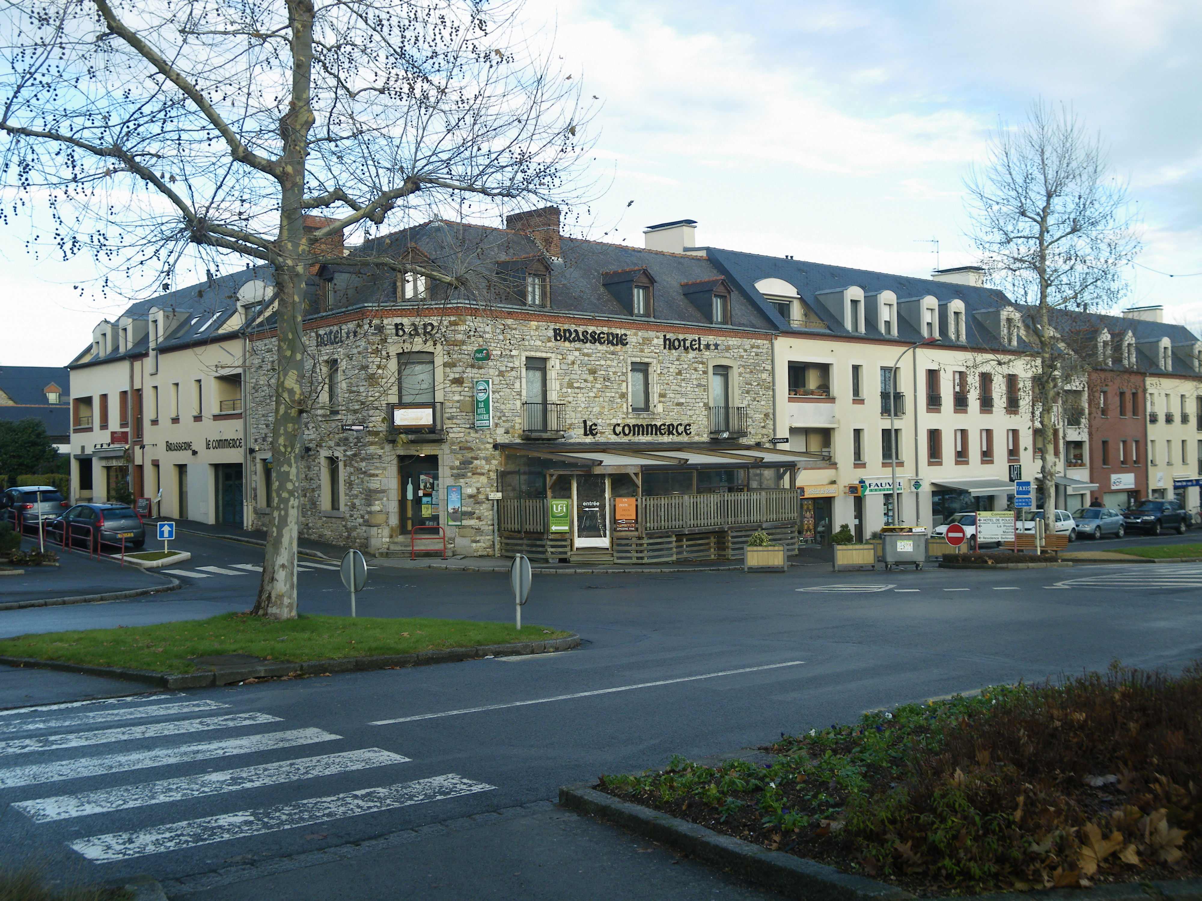 hotel restaurant du commerce a st gregoire